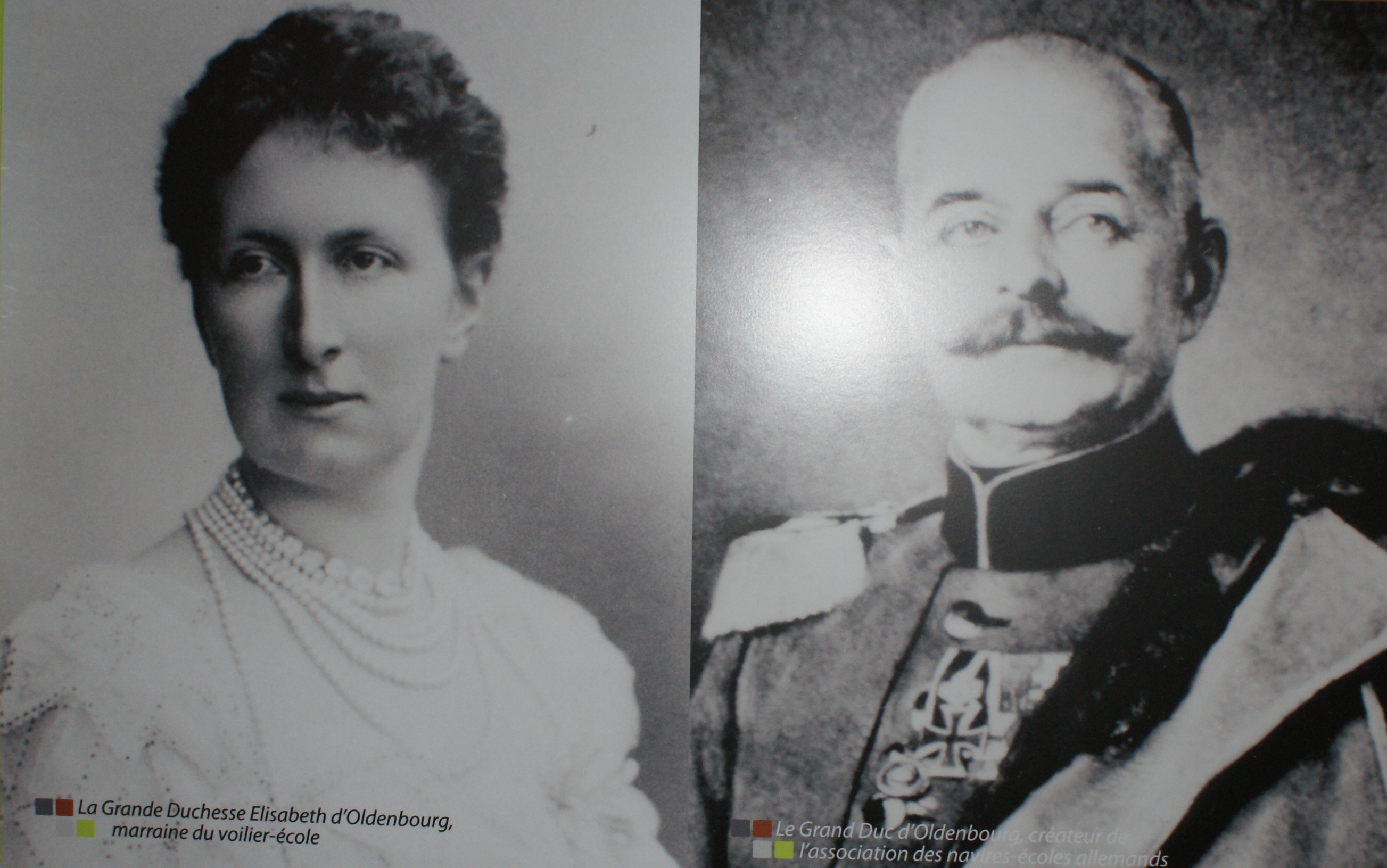 L'un des panneaux de l'exposition intérieure aménagée dans l'entrepont du trois-mâts Duchesse Anne où figurent les portraits d'époque de la grande duchesse et grand duc Oldenbourg